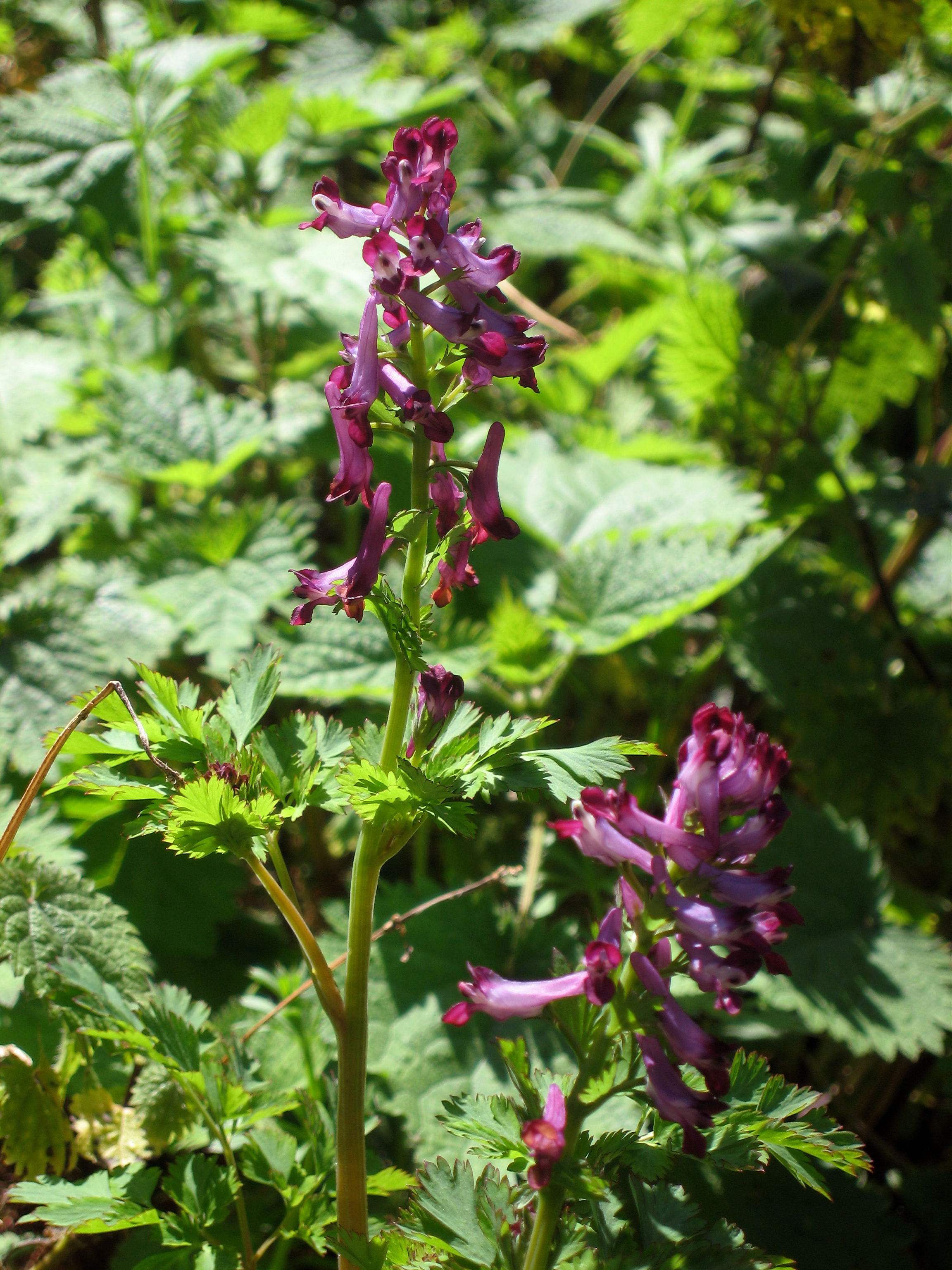 Corydalis